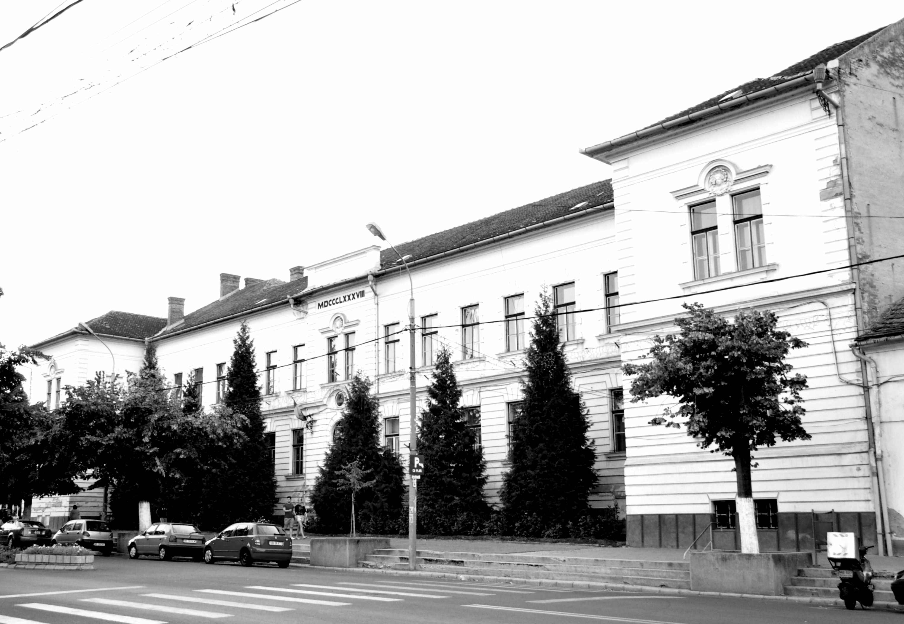 Gimnaziul de Stat Traian (1888)